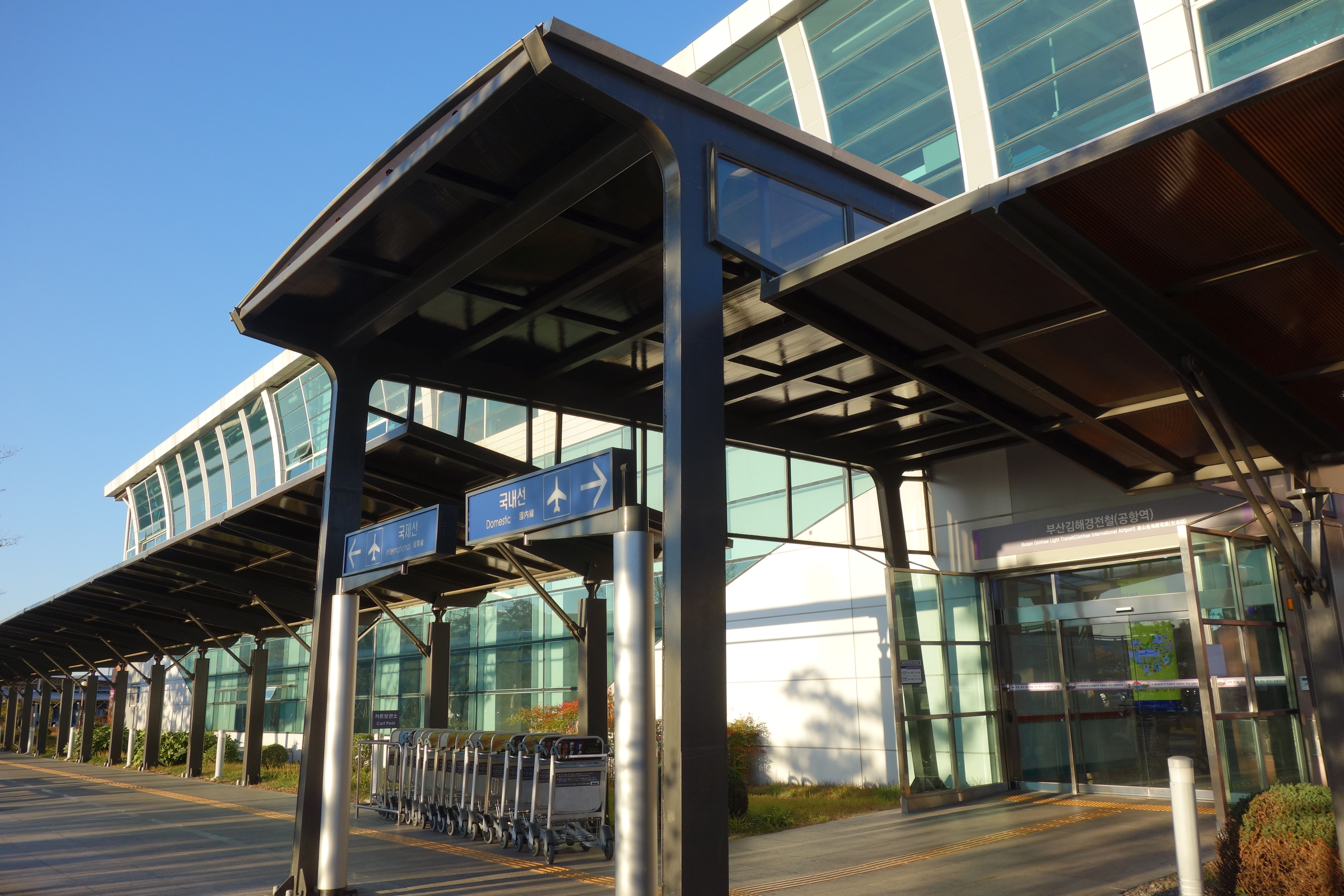 釜山金海軽電鉄 空港駅駅舎